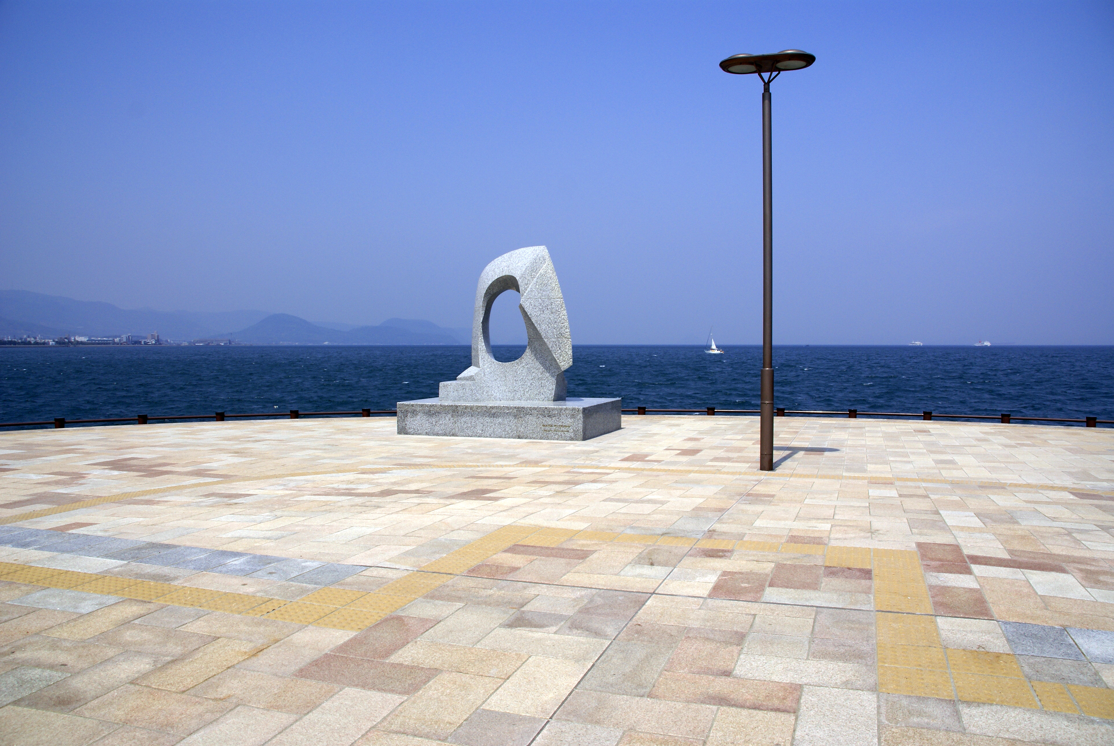 Seto-Sea-pallet in Sunport Takamatsu, Kagawa prefecture, Japan